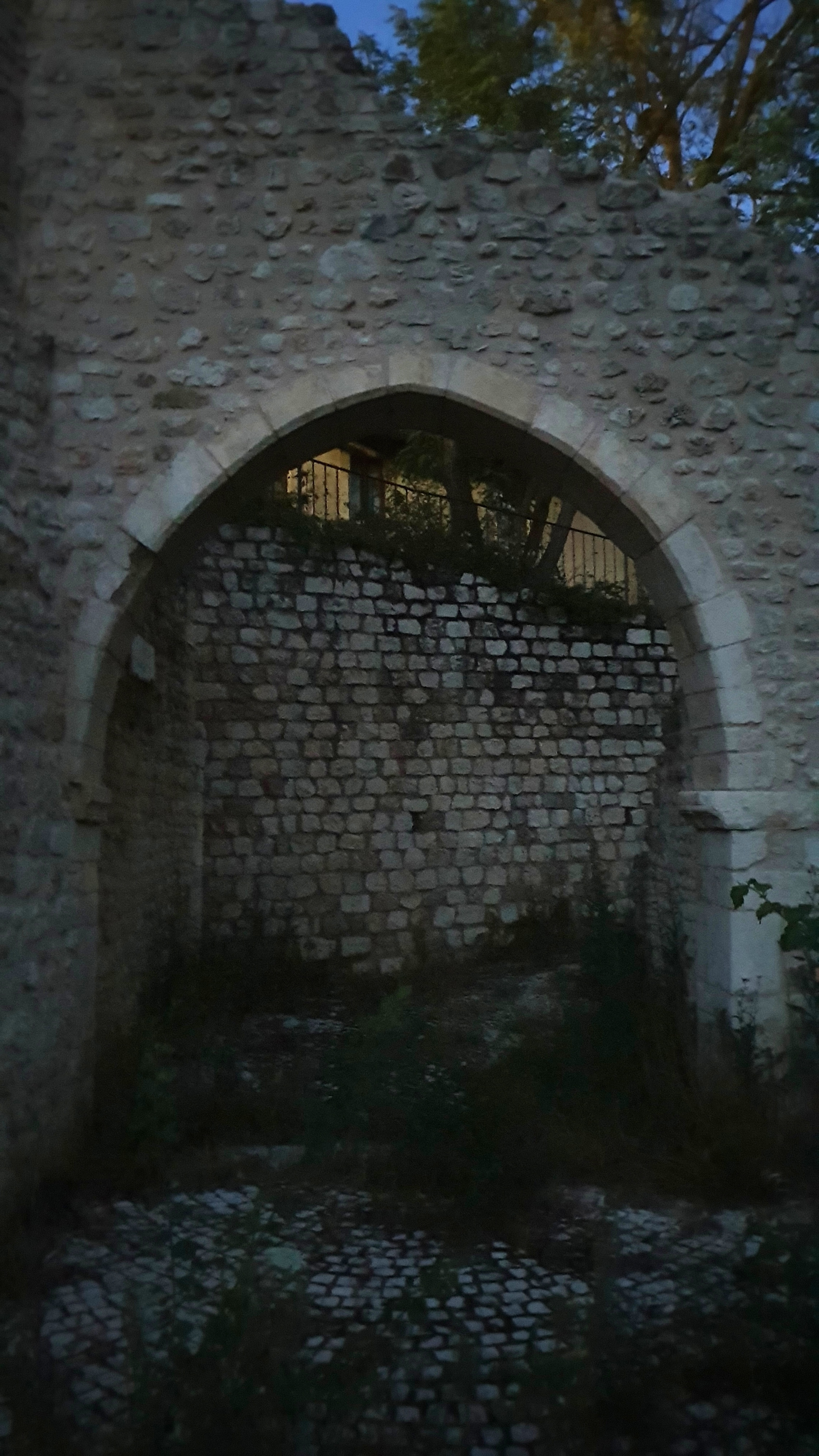 L'Aquila: Porta Roiana